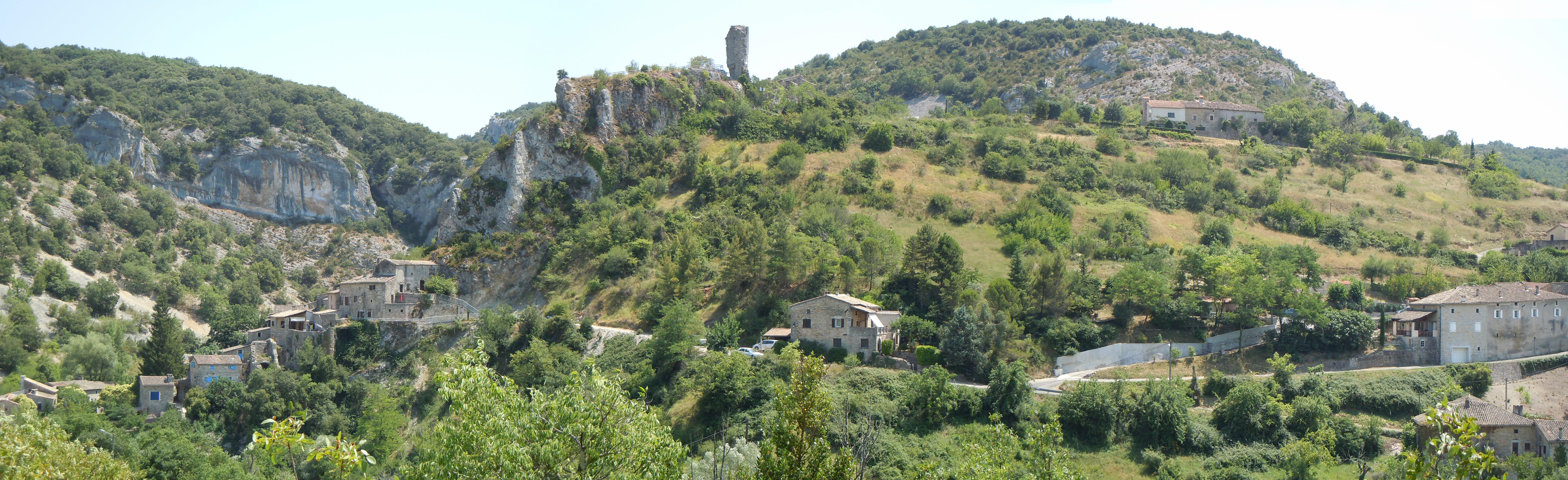 Rochecolombe - Ardèche - France - Vue du vieux village